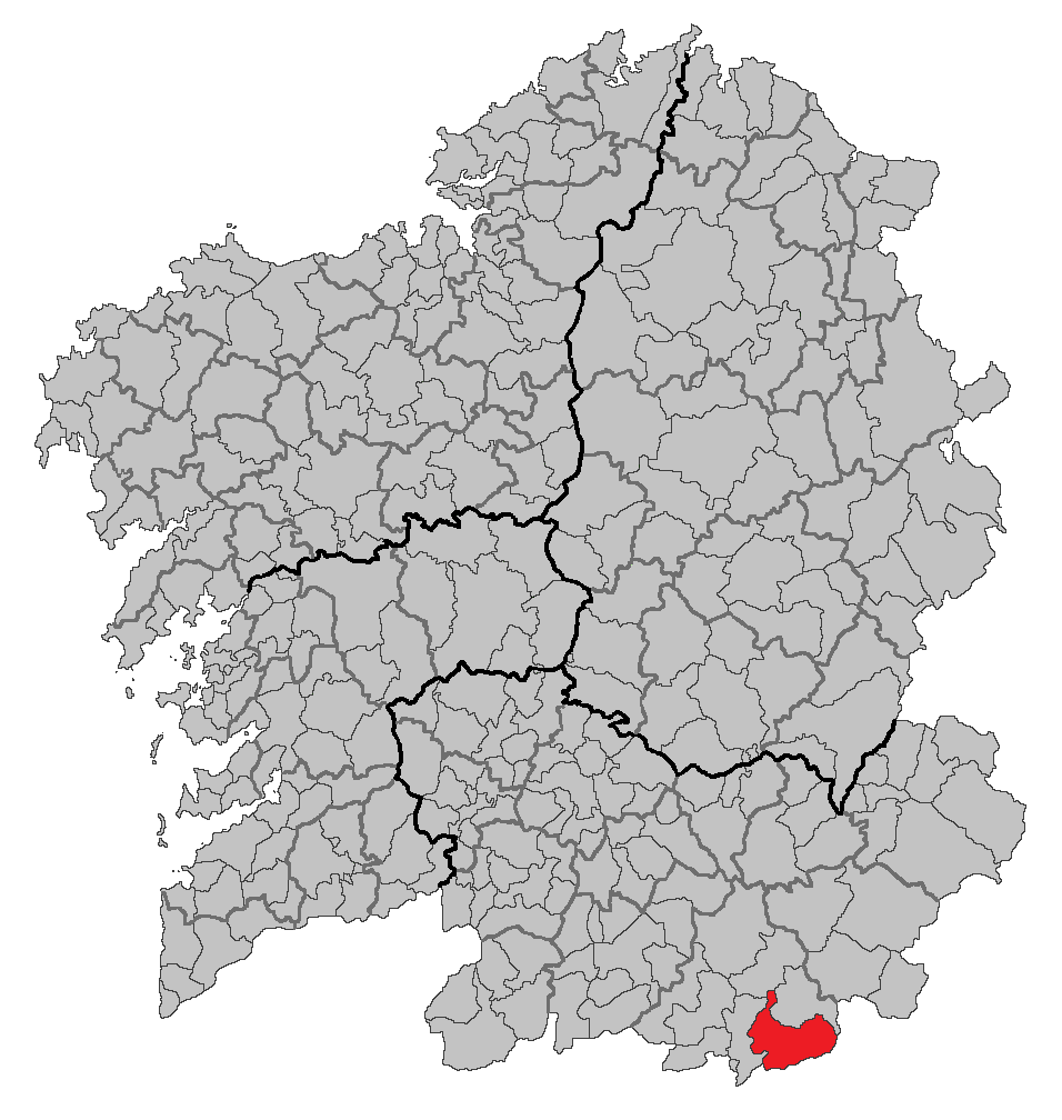 Mapa coa localización do concello de Vilardevós.